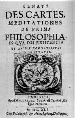 Voorblad van de Franse editie van Meditaties uit 1641.